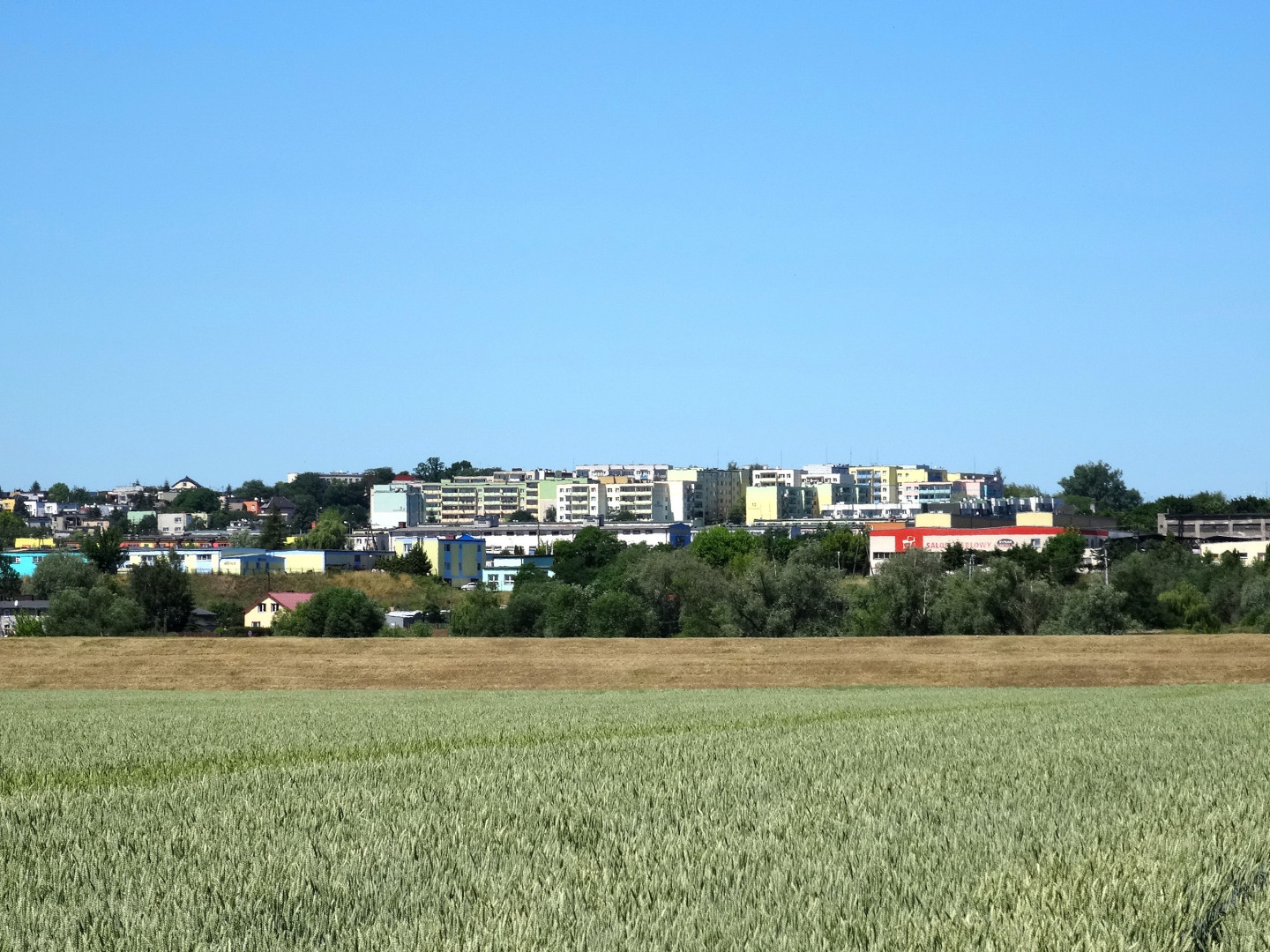 Miasto Świecie